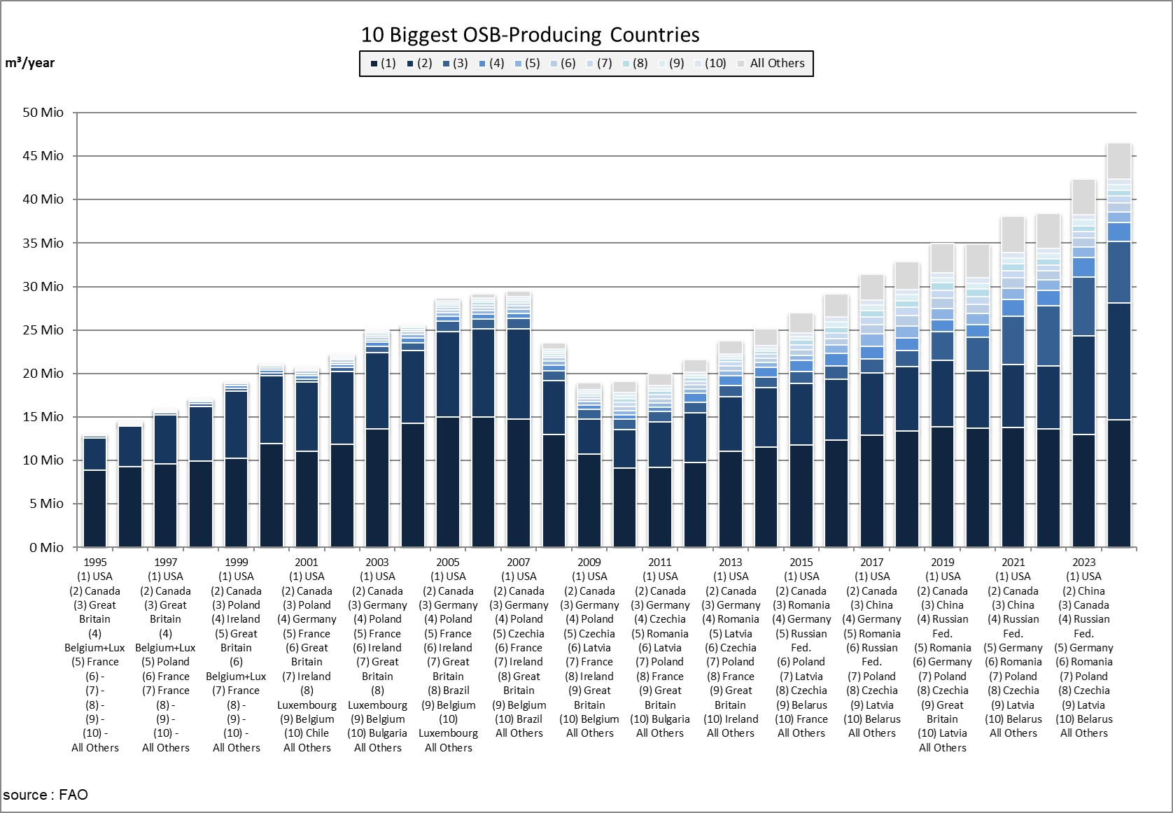 jährliche OSB-Produktion der jeweils 10 stärksten Nationen